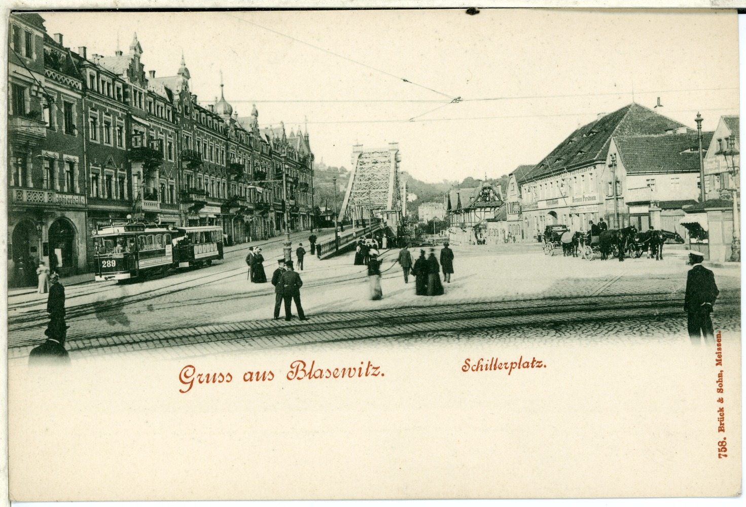 Dresden; Blasewitz - Schillerplatz This postcard is from publisher Brück & Sohn in Meißen ( postcard has a unique number 00758 and is available in a higher resolution at the publisher. This images was uploaded in a cooperation project between Wikipedians and the publisher.